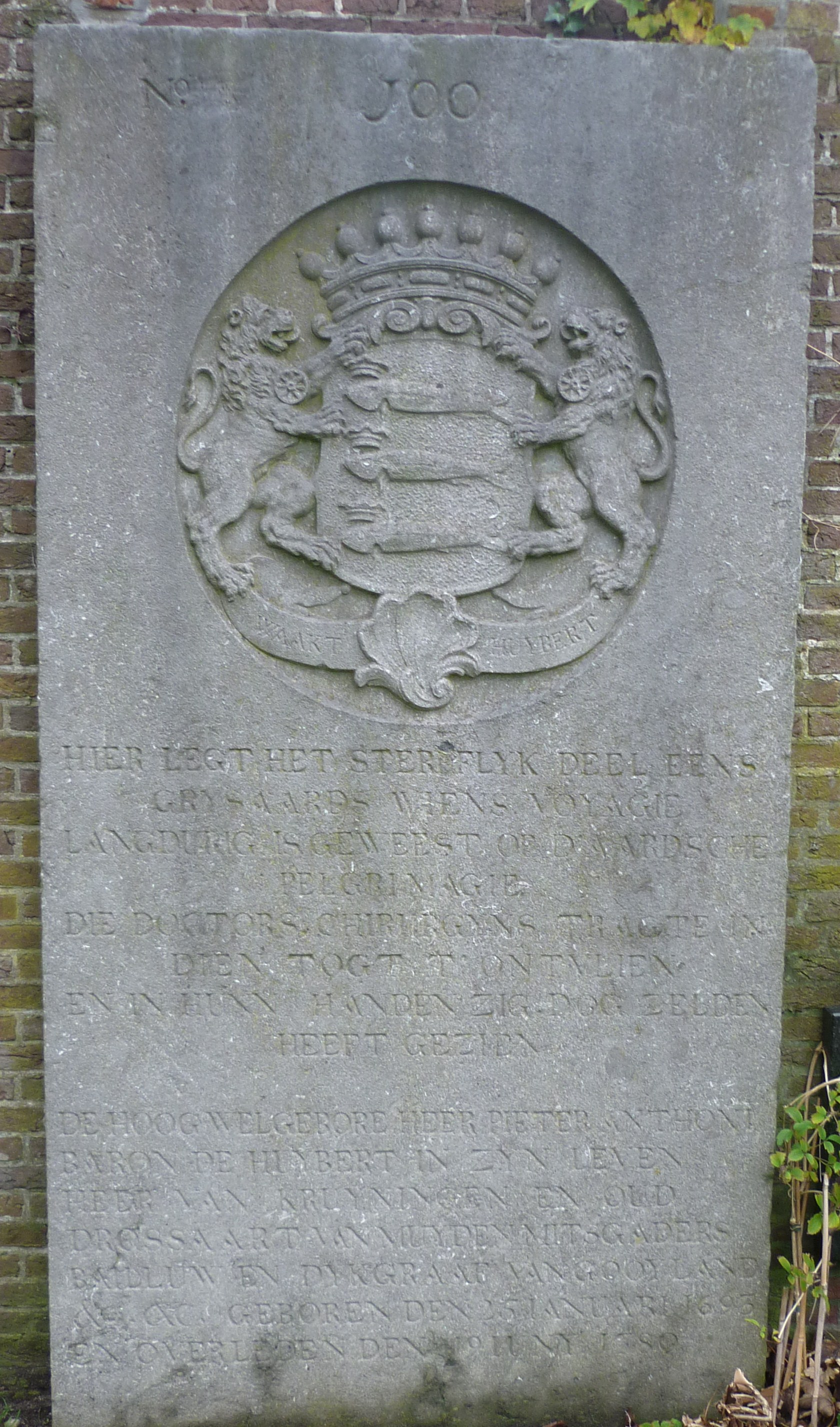 Begraafplaats Ter Navolging in Scheveningen, oudste graf, baron de Huybert